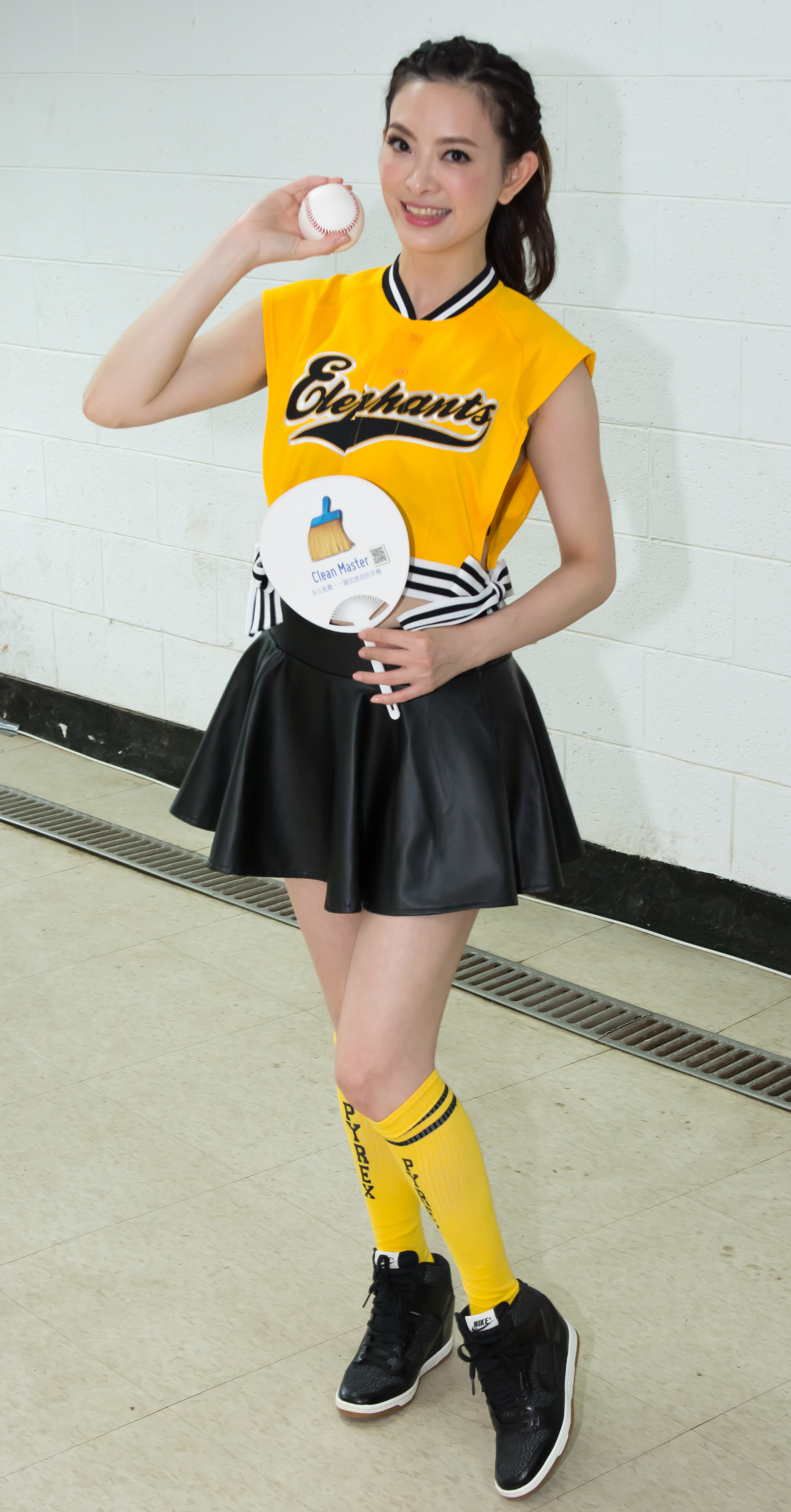 藝人劉真出席Clean Master中信兄弟主題日，右手持棒球用球，左手持Clean Master廣告團扇。